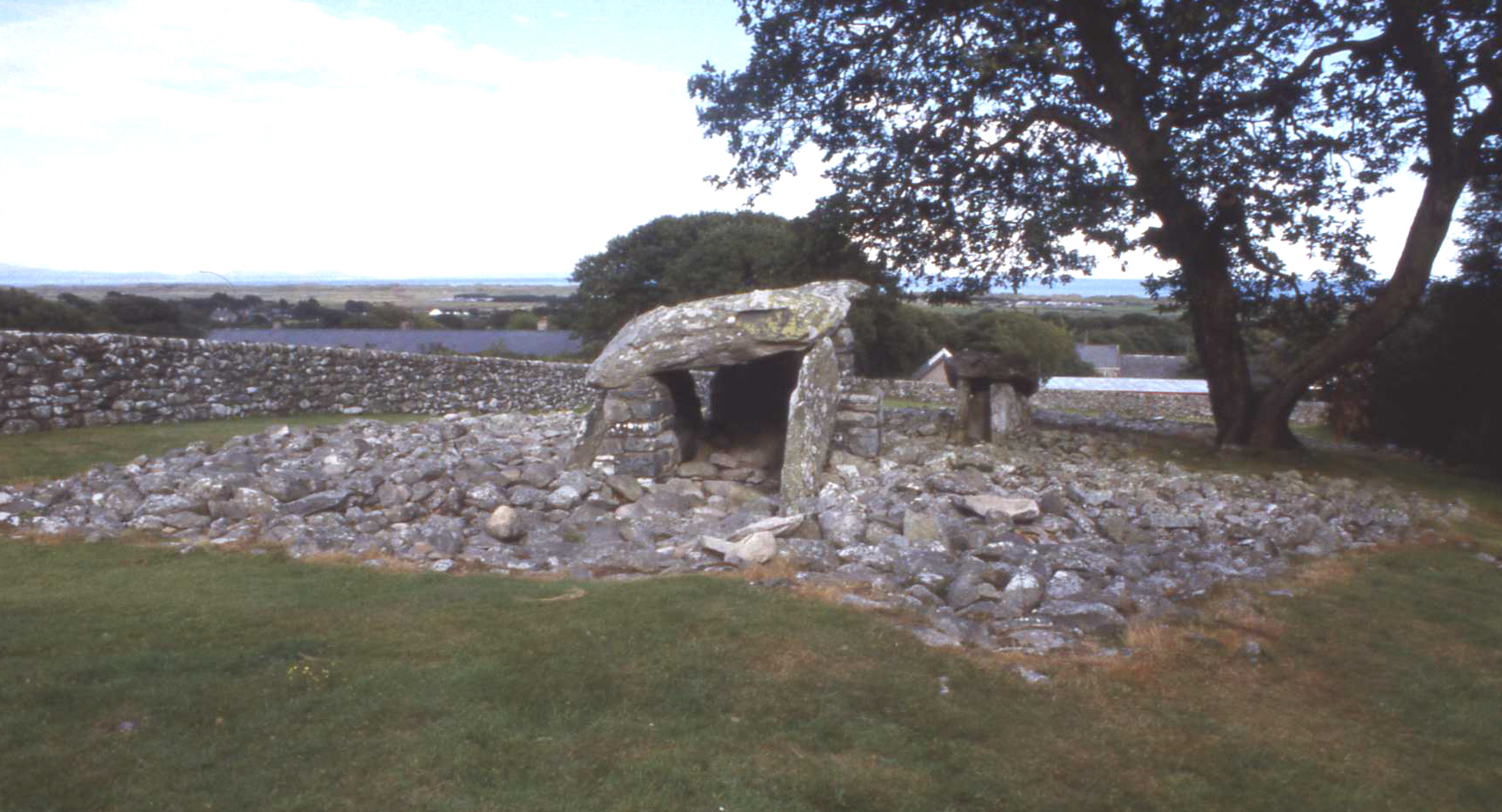 Diffryn Ardudwy